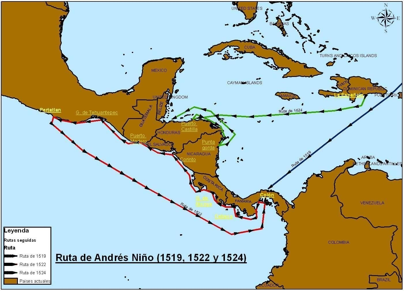 Plano de rutas de exploración de Andrés Niño.